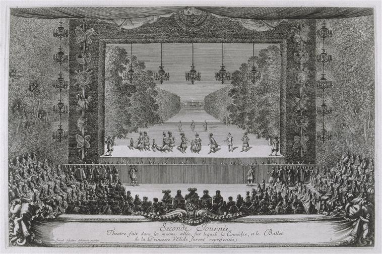 La Fête "Les Plaisirs de l'Ile Enchantée" donnée par Louis XIV à Versailles, estampe, 28 cm x 42,5 cm, Musée national des châteaux de Versailles et de Trianon. Théâtre ephémère installé dans les jardins de Versailles en 1664 pour le représentation de la comédie et du ballet La Princesse d'Elide.